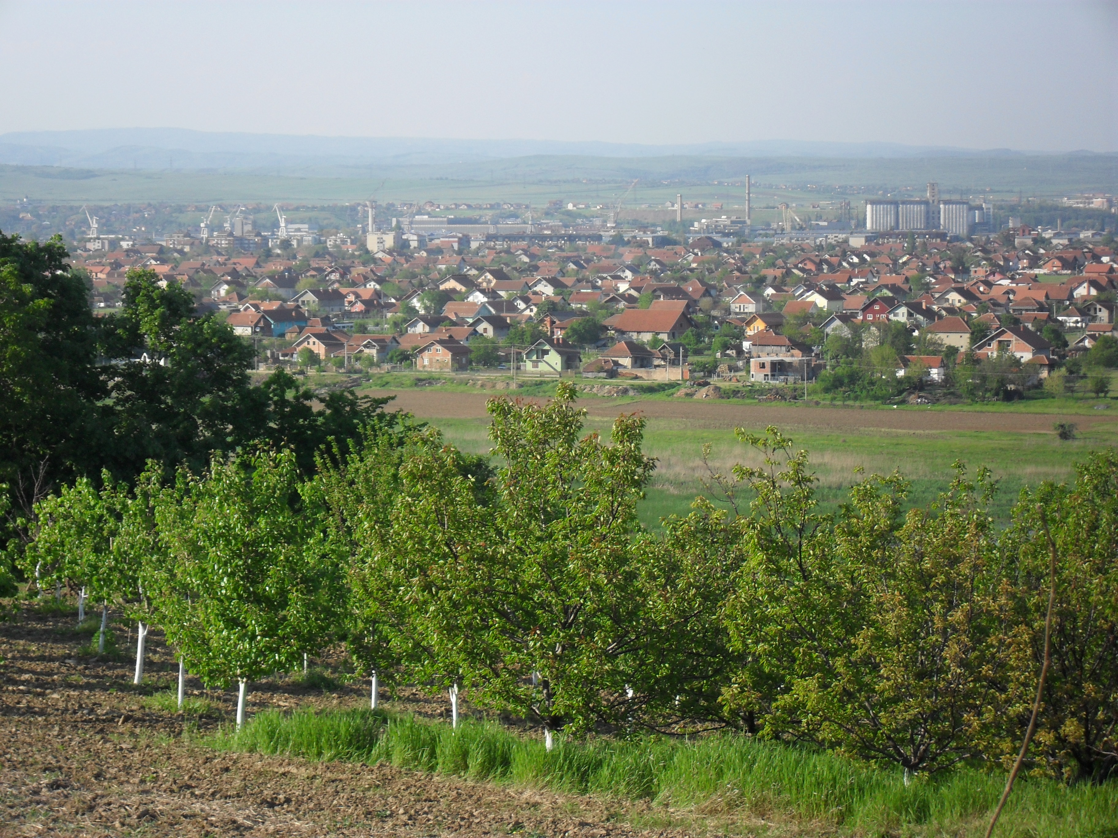 Kladovo